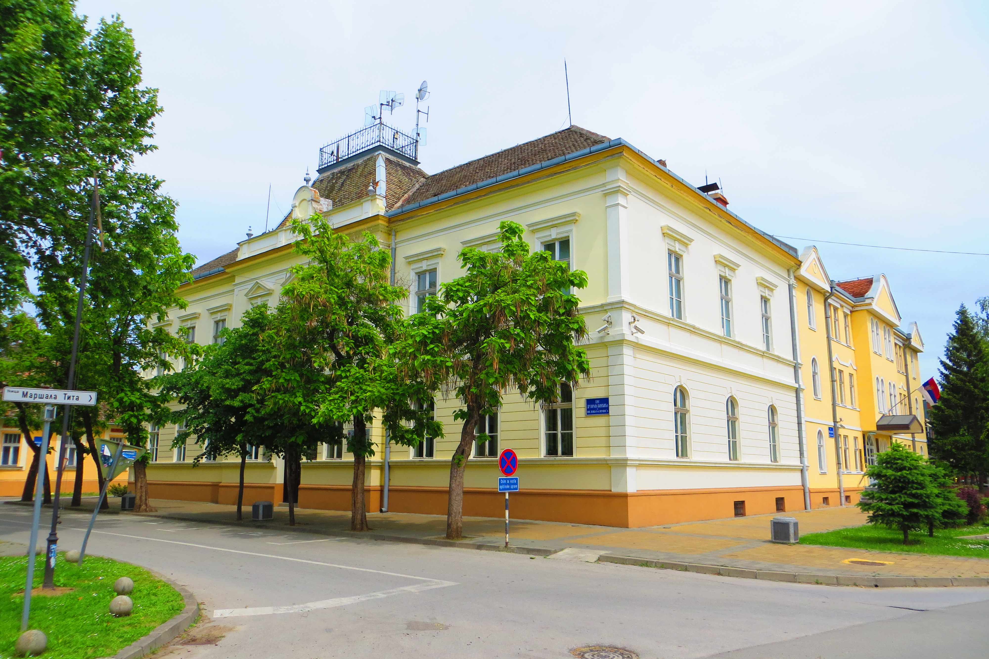 Zmaj Jovina